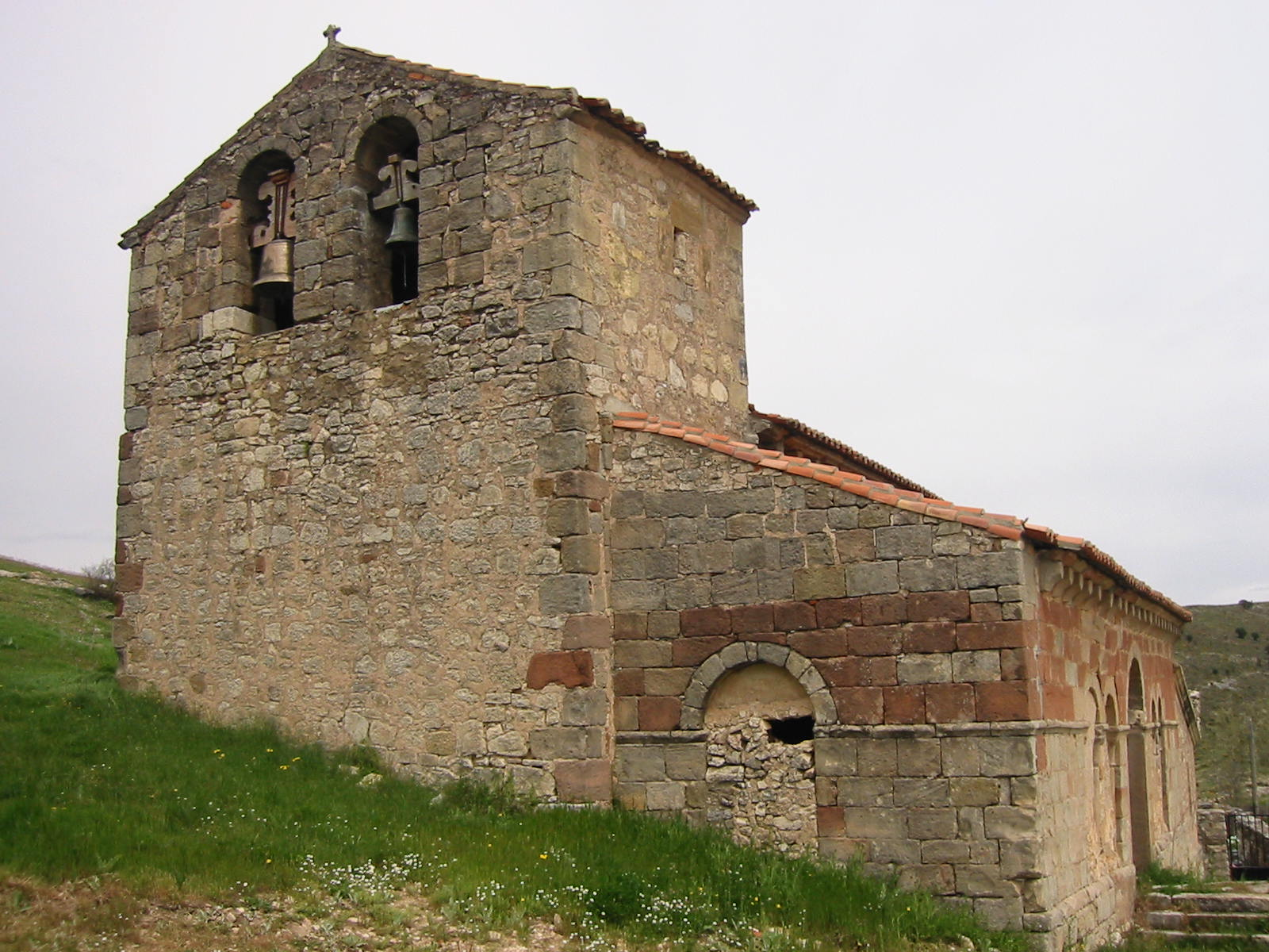 Iglesia de San Juan Degollado (Jodrá del Pinar, Saúca, Guadalajara)